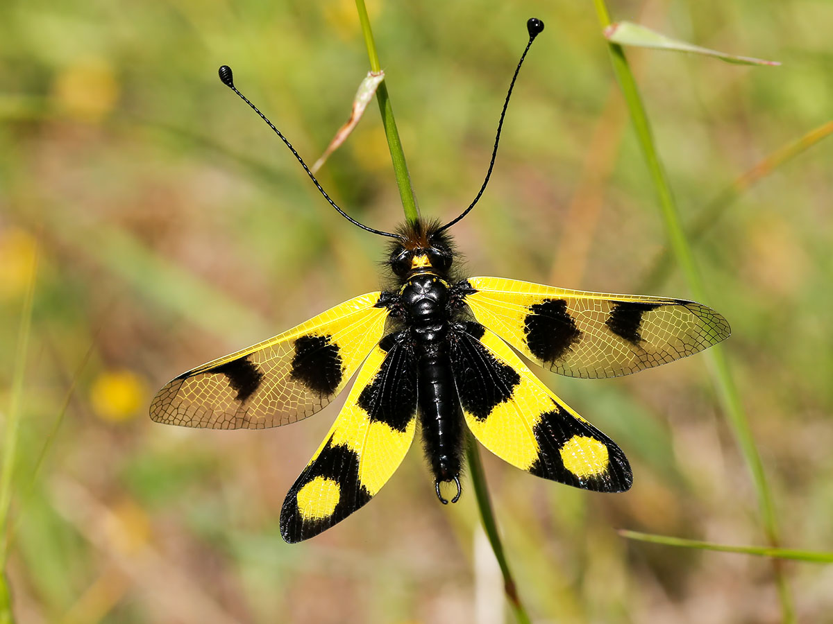 Libelloides macaronius from Macedonia